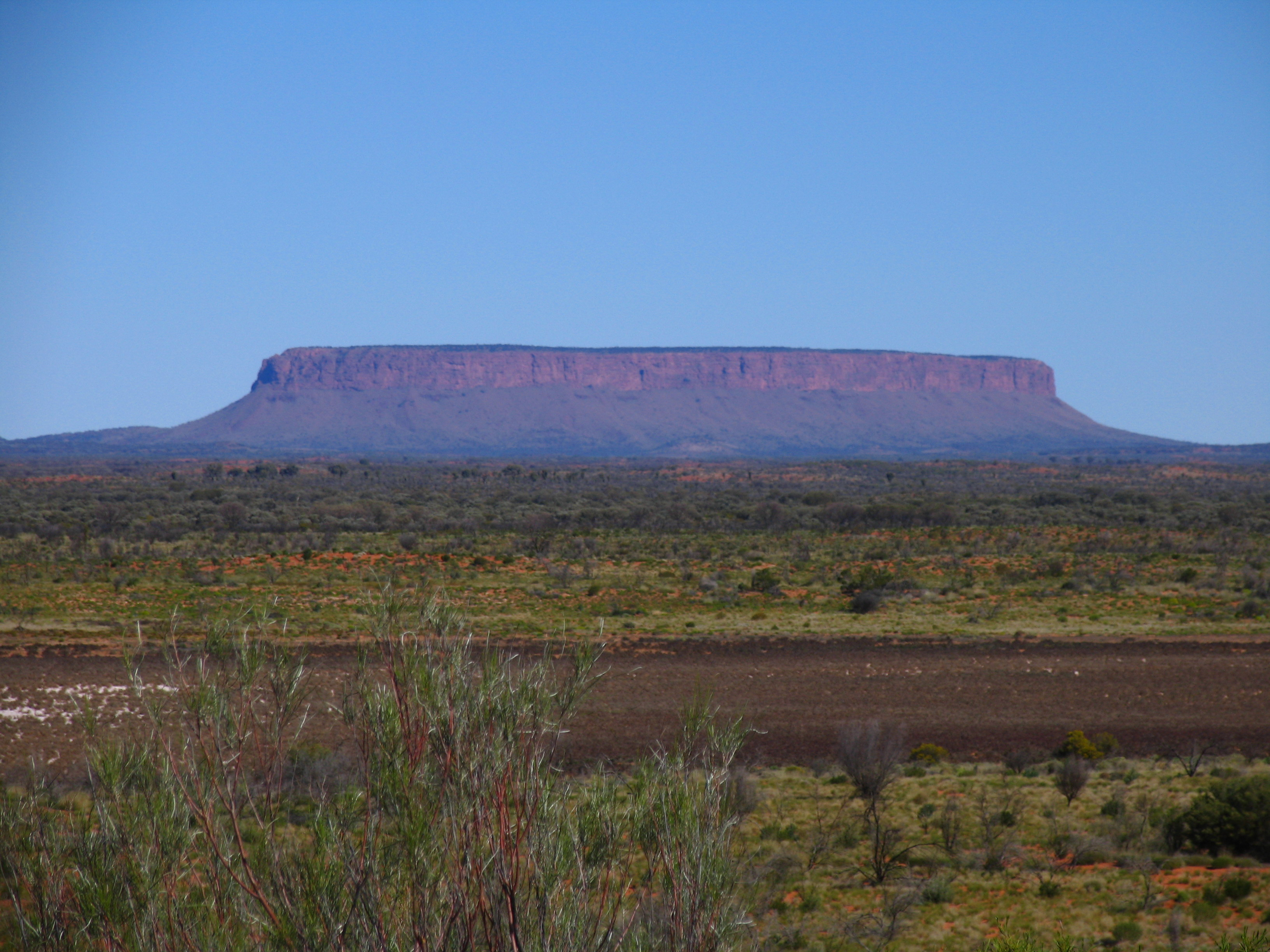 Mt. Conner von der Straße zu Uluru